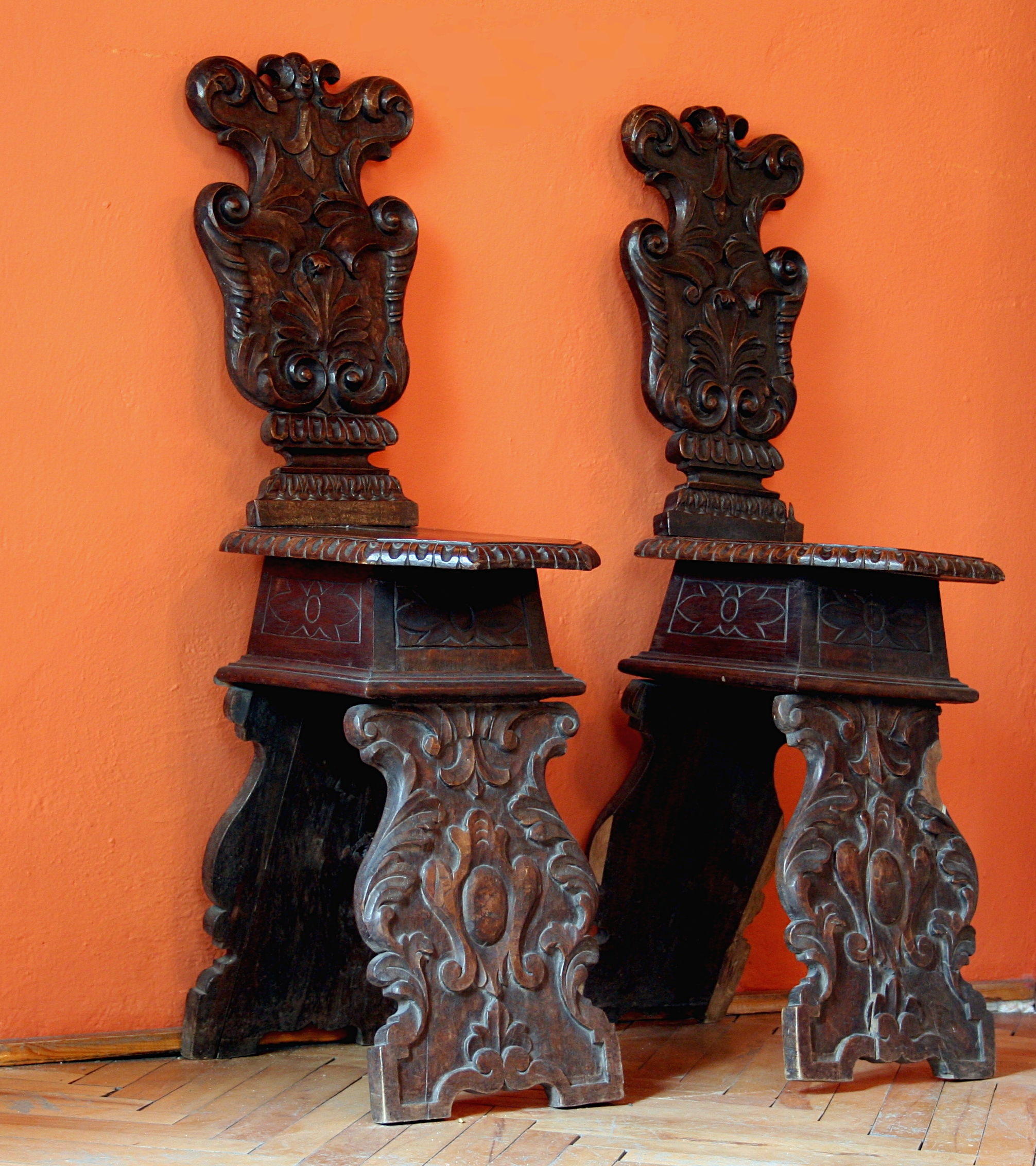 Zydle - sgebello, eksponat w Muzeum Regionalnym im. Zygmunta Krasińskiego w Złotym Potoku